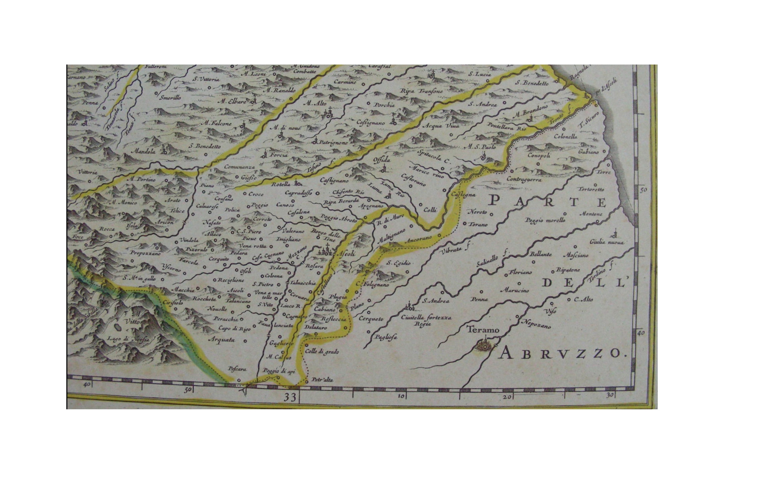 cartian geografica